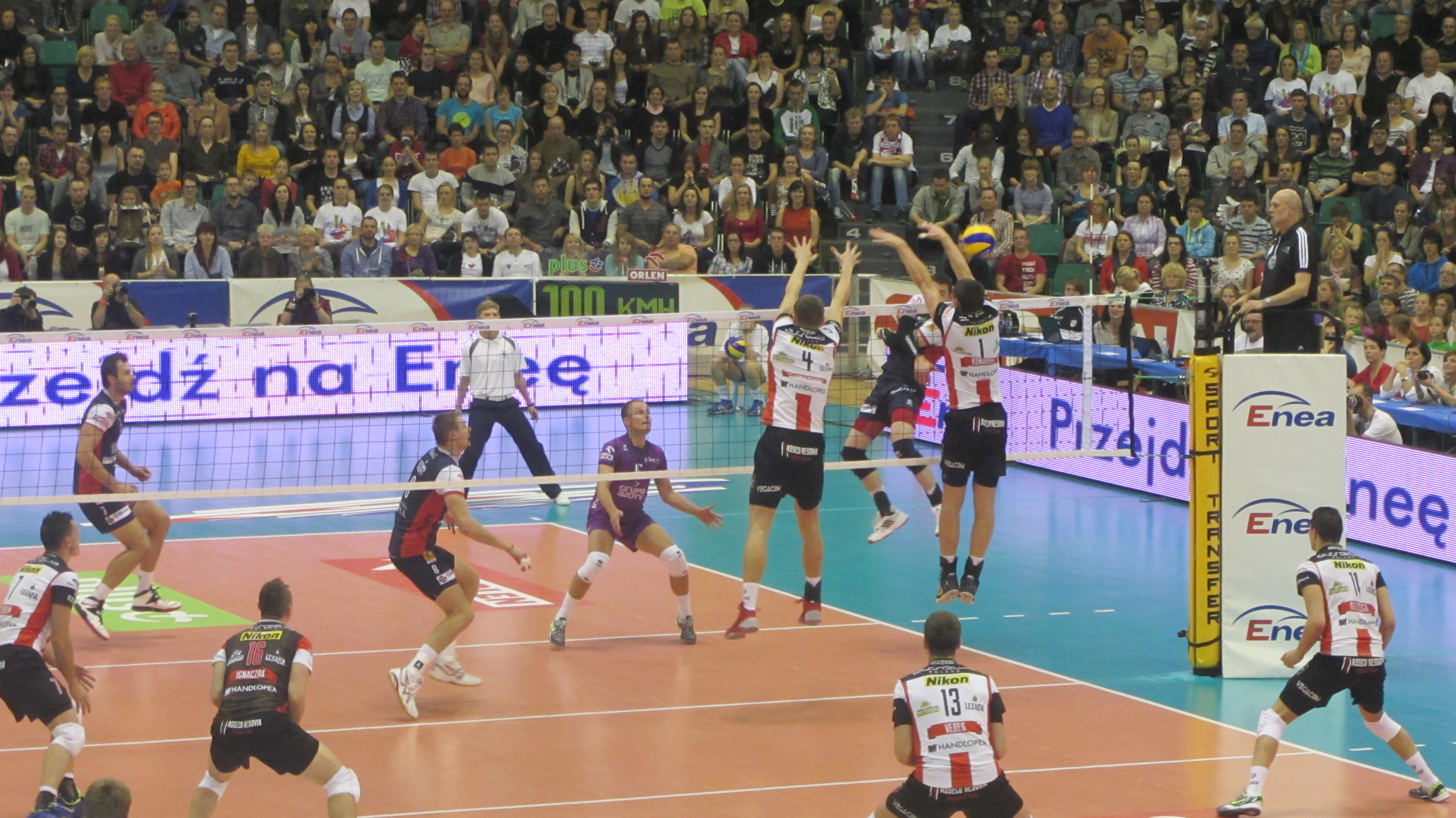 Zdjęcie z meczu o Superpuchar Polski w piłce siatkowej mężczyzn, który odbył się 16 października 2013 w poznańskiej Arenie.